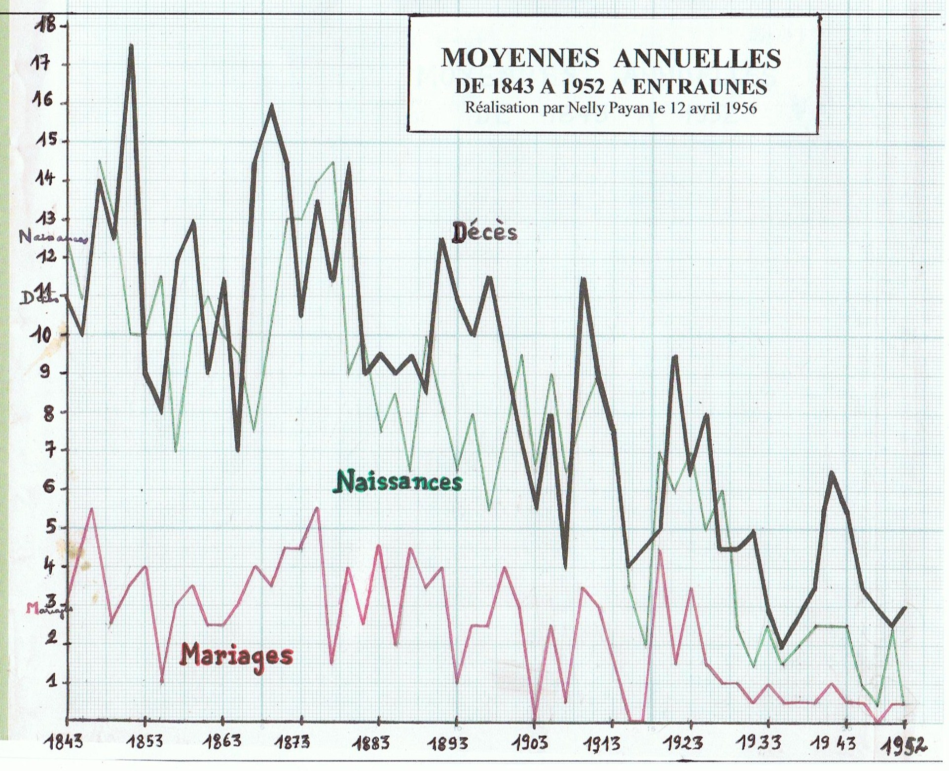 Pour la commune d'Entraunes, évolution en moyenne annuelle de 1843 à 1952 des mariages, naissances et décès. Pour chaque date pointée, la moyenne annuelle a été calculée sur la période antérieure de deux ans et plus d'où les 0,5.